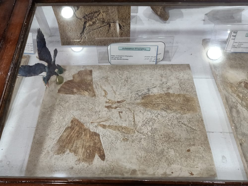 حفرية طائر الأركيوبتركس داخل المتحف الجيولوجي المصري